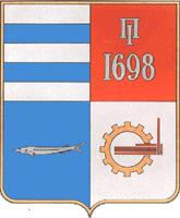 Герб Таганрога советского времени